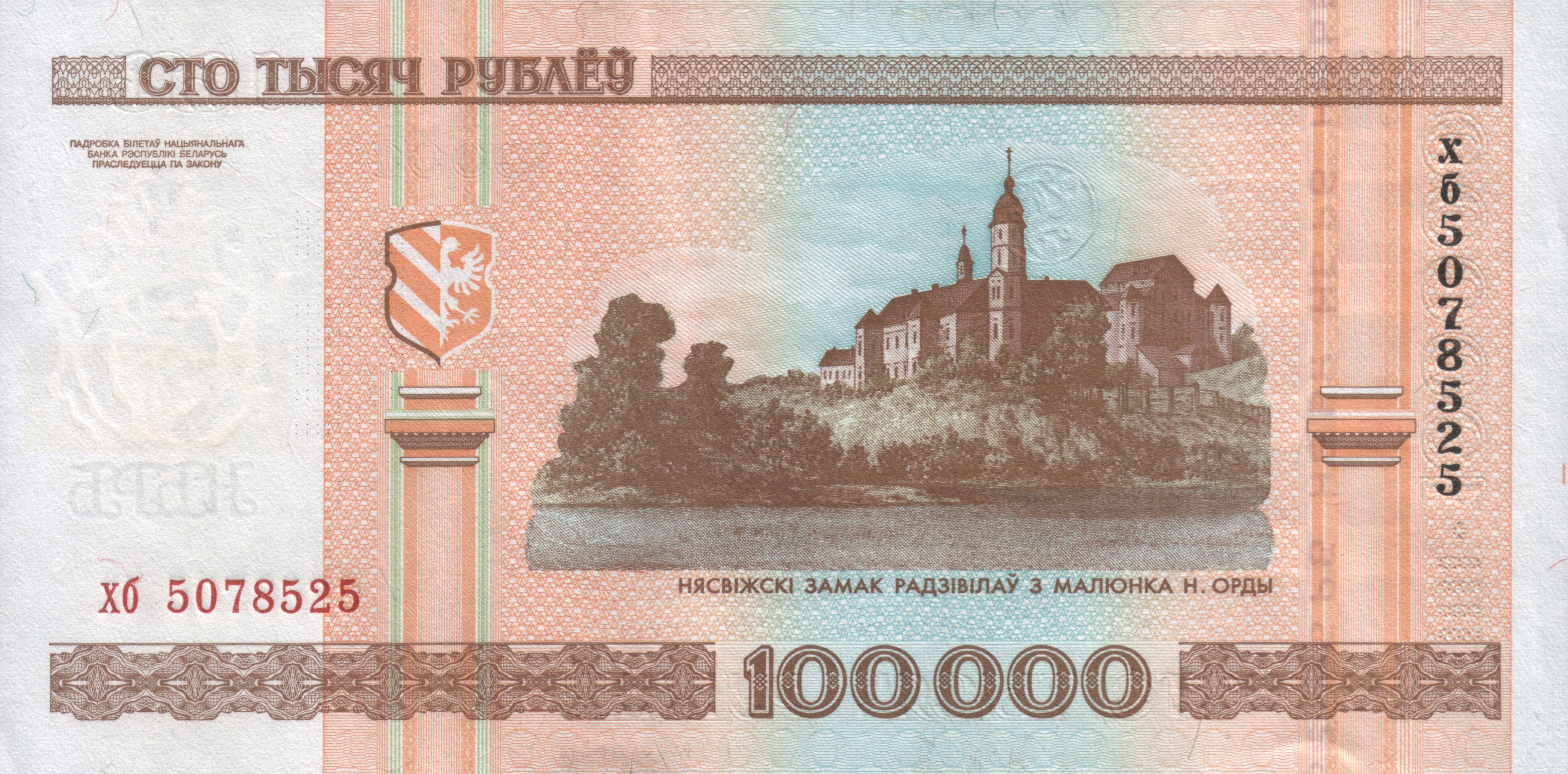 2000 Belarus 100000 rubles bill. Back.